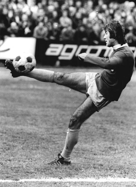 ADN-ZB-Schaar- -4.10.75-be-Suhl: Bei der zweiten Hauptrunde des FDGB-Fußball-Pokalwettbewerb spielte am 4.10.1975 Motor Suhl gegen den FC Carl Zeiß Jena in Suhl 0:3. Hier Peter Ducke (Jena) bei einer Flanke vor dem Suhler Tor.